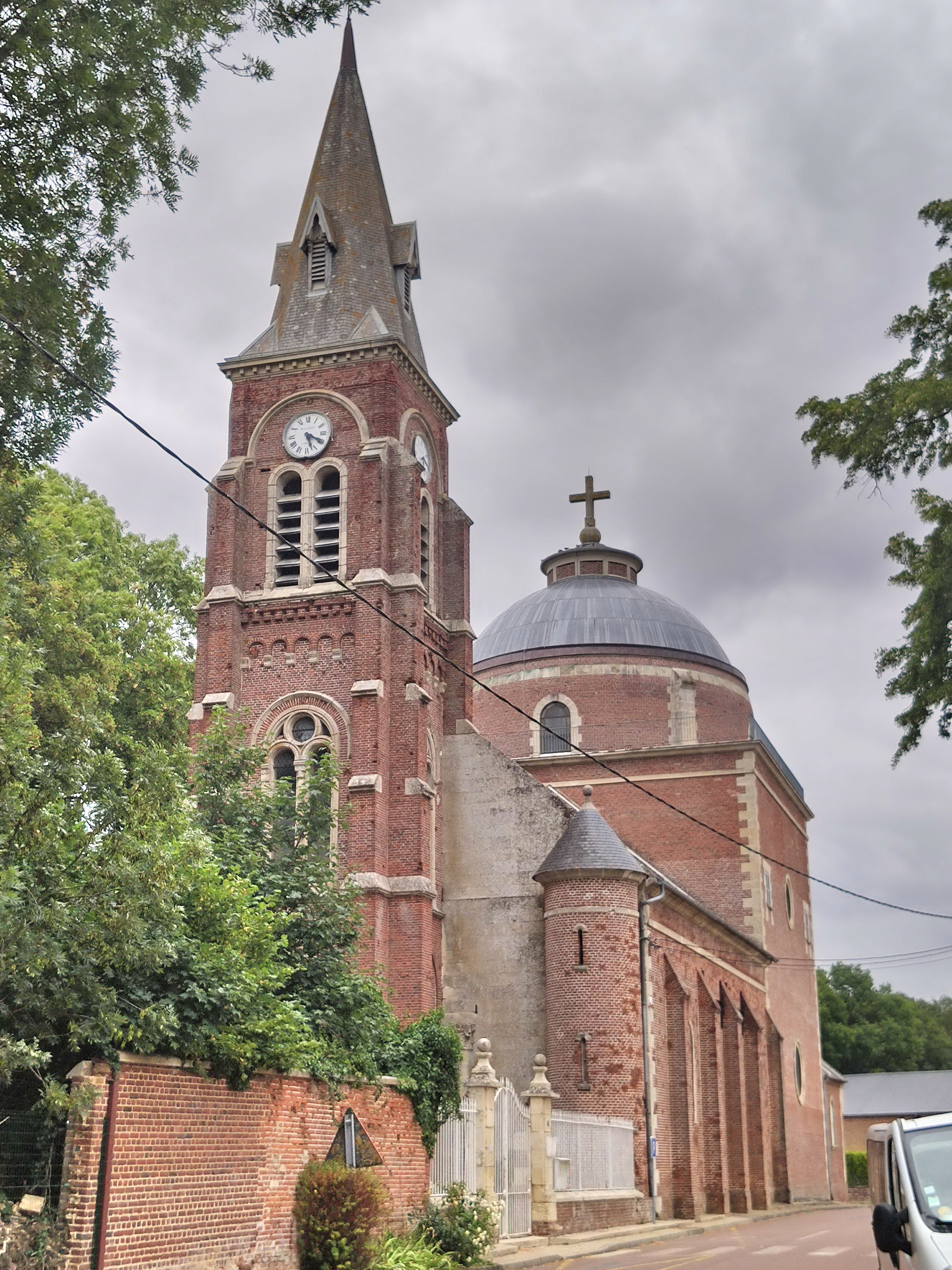 Grivesnes - Eglise